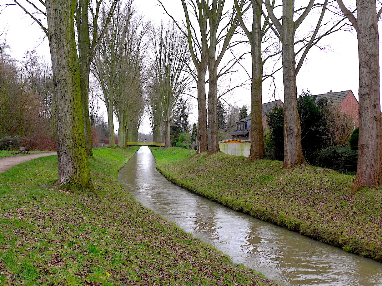 Южный Дюссель в Феннхаузене, Дюссельдорф.